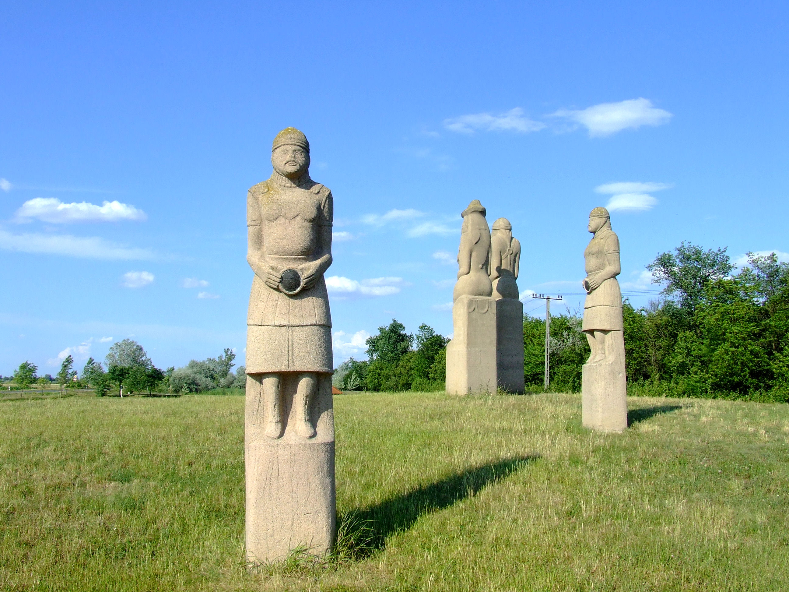 Kun emlékhely Karcag határában. Györfi Sándor szobrászművész alkotása, 1995-ben avatták fel.